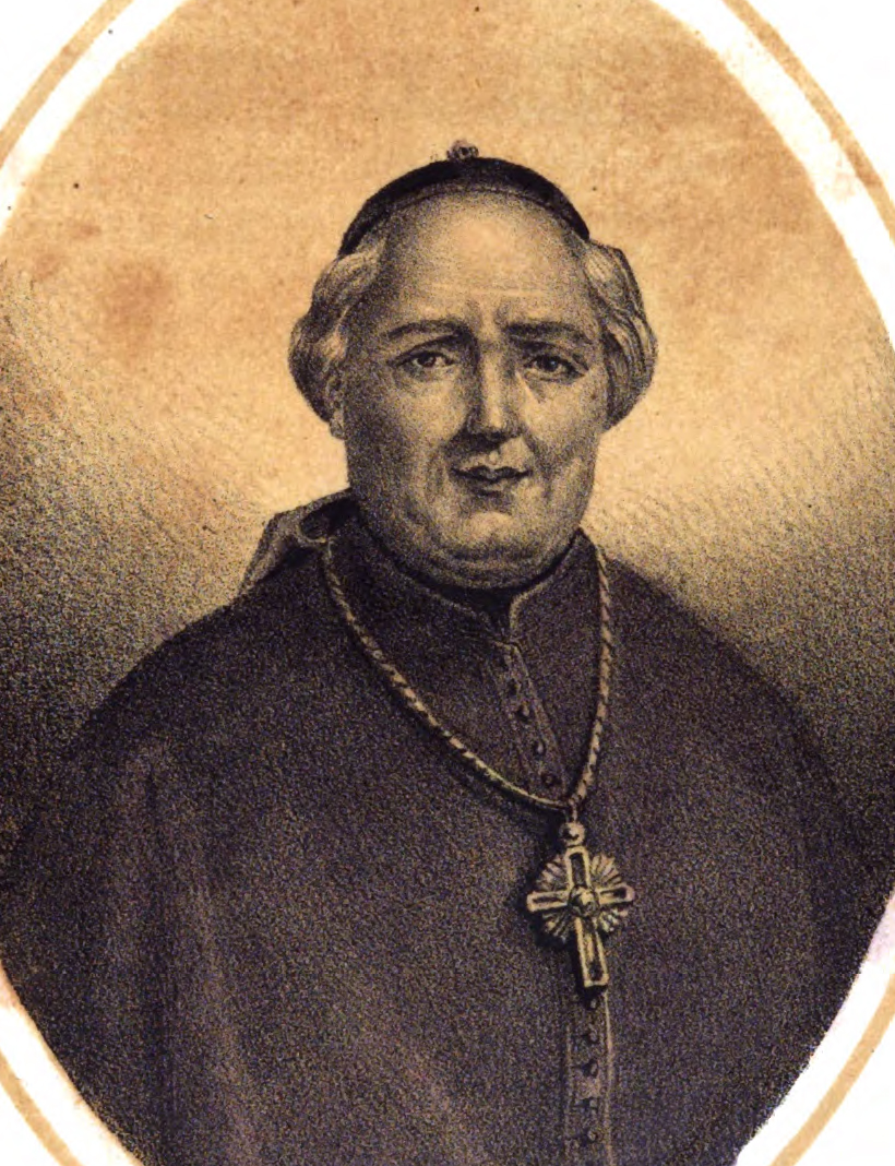 Antonio de Acuña.